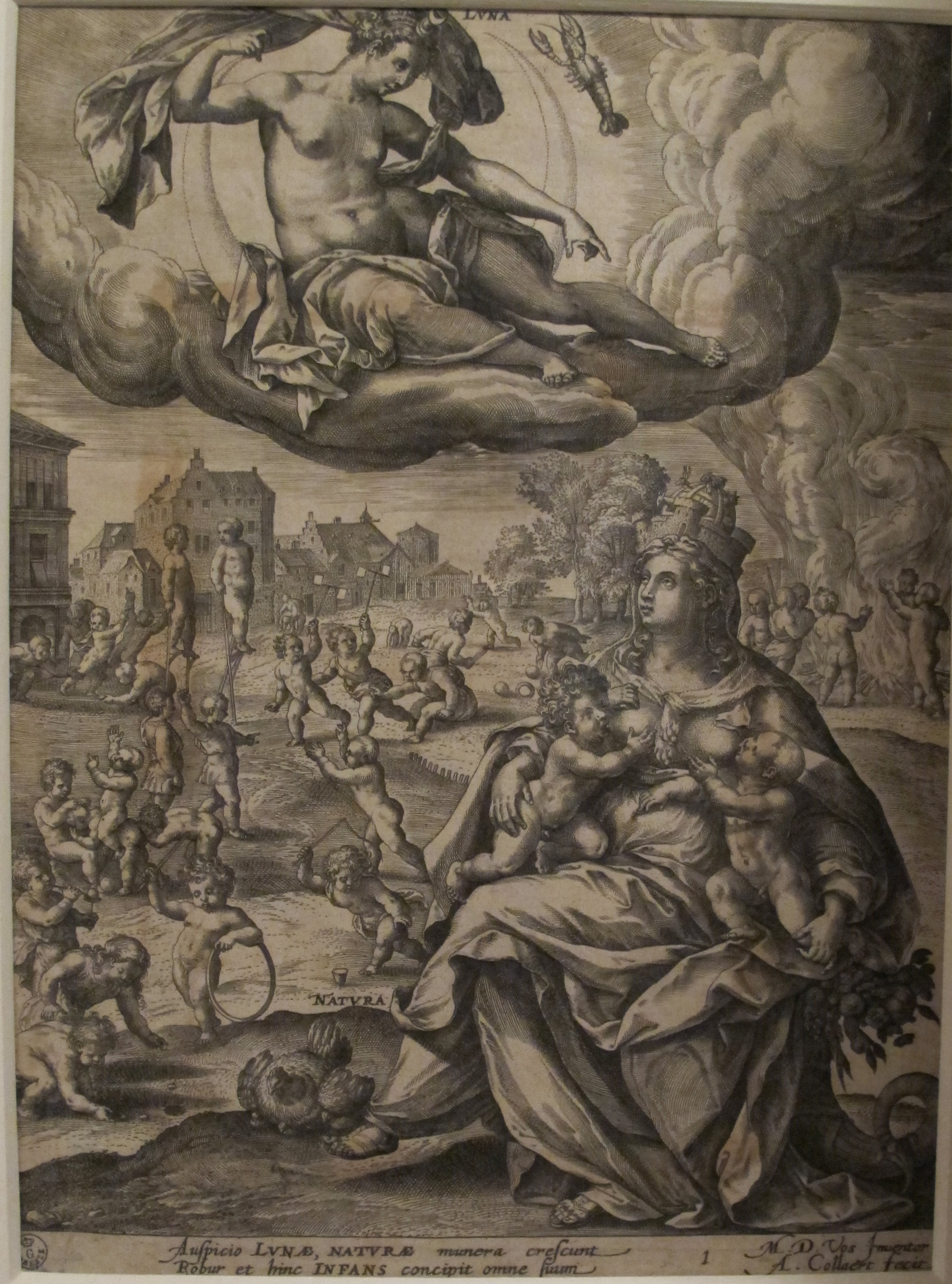 Adraien collaert e maarten de vos, sette pianeti e età della vita- 01 luna infanzia